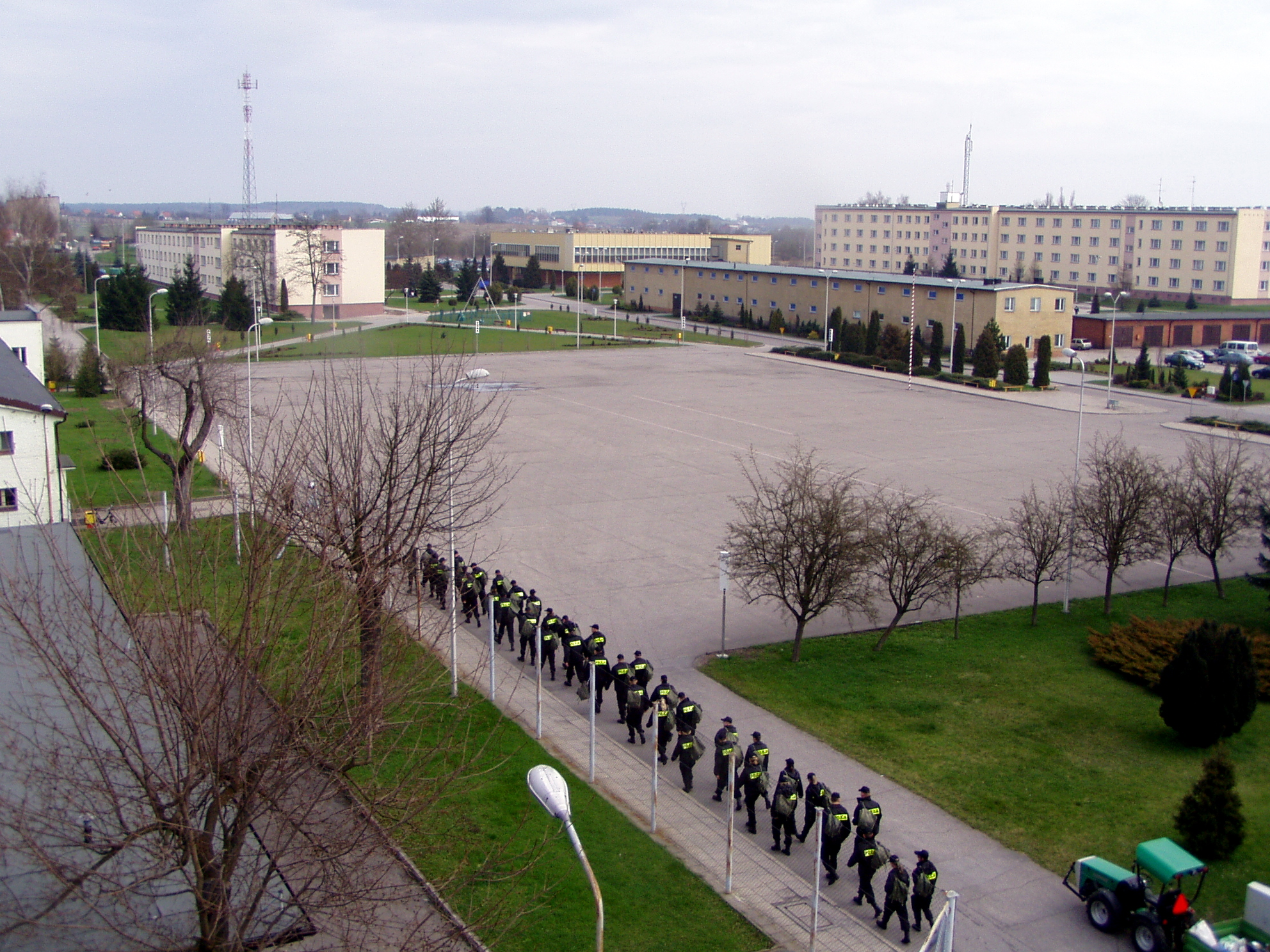 Plac apelowy Wyższej Szkoły Policji w Szczytnie